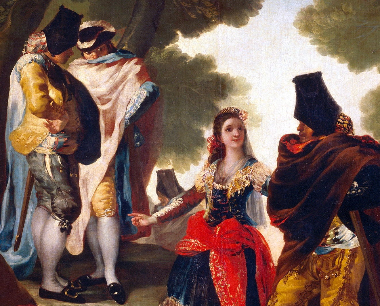 Francisco de Goya (1746–1828): El paseo de Andalucía, 1777, Öl auf Leinwand, 275 × 190 cm (Ausschnitt). Museo del Prado, Madrid.